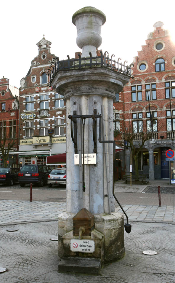 Aarschot Grote Markt zonder nummer Armpomp